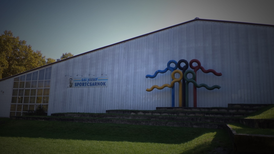 Gál József Sportcsarnok, Cegléd